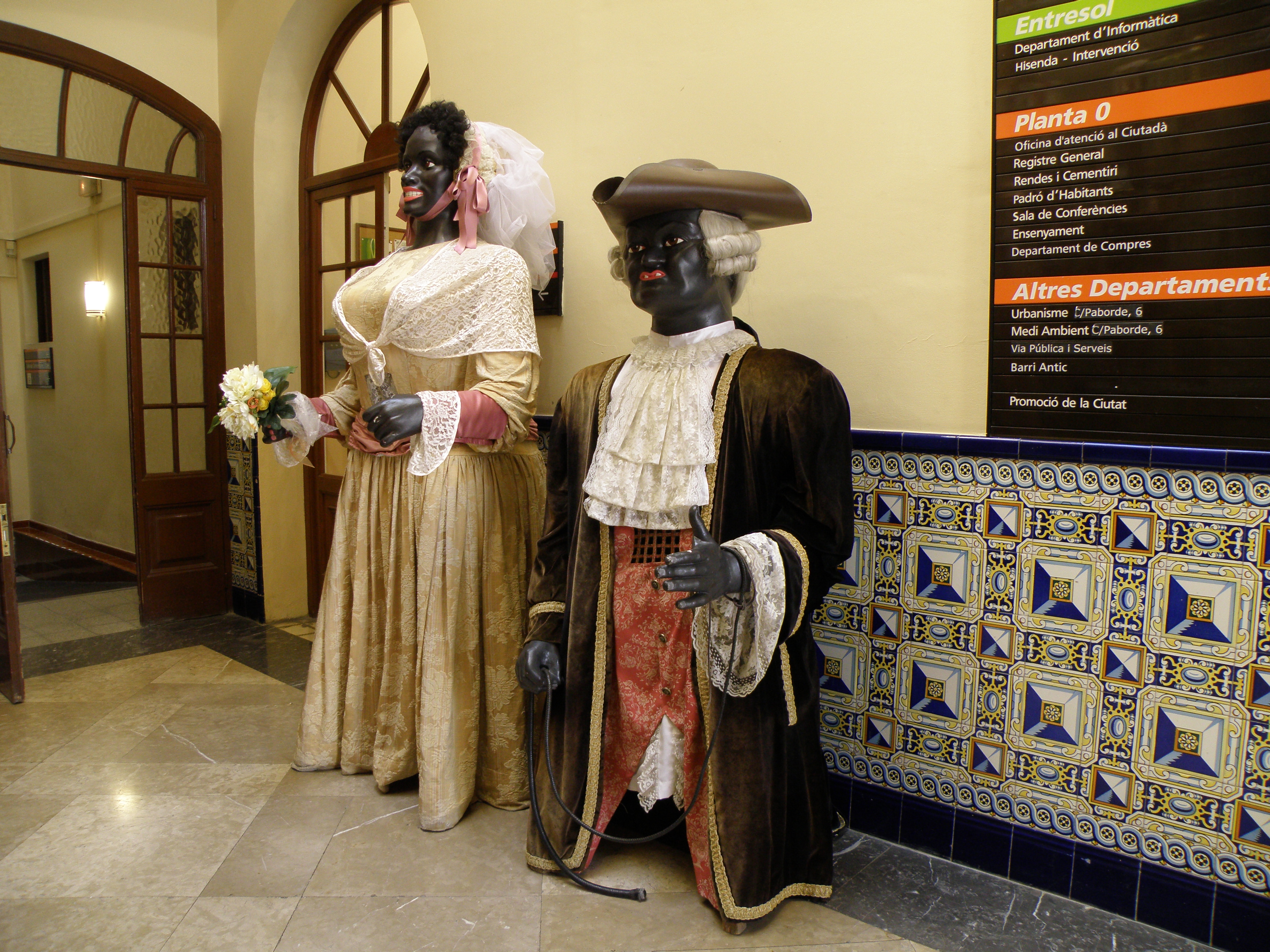 Gegants de Valls (Alt Camp). En primer terme, en Lladrefaves.